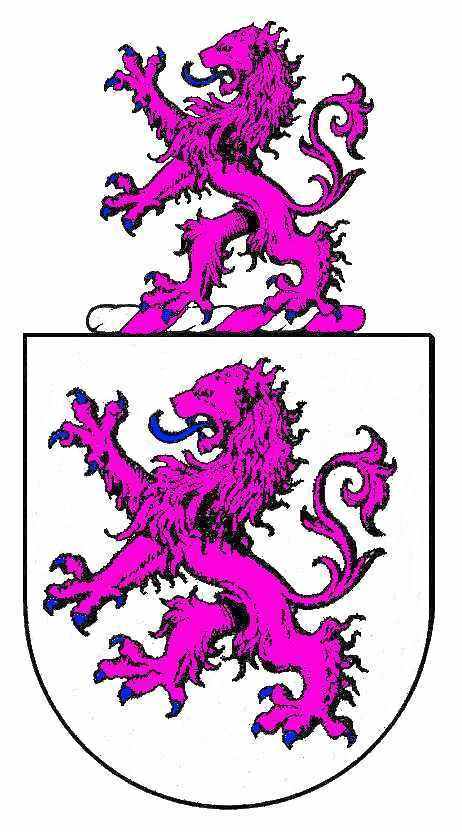 Brasão dos Silvas